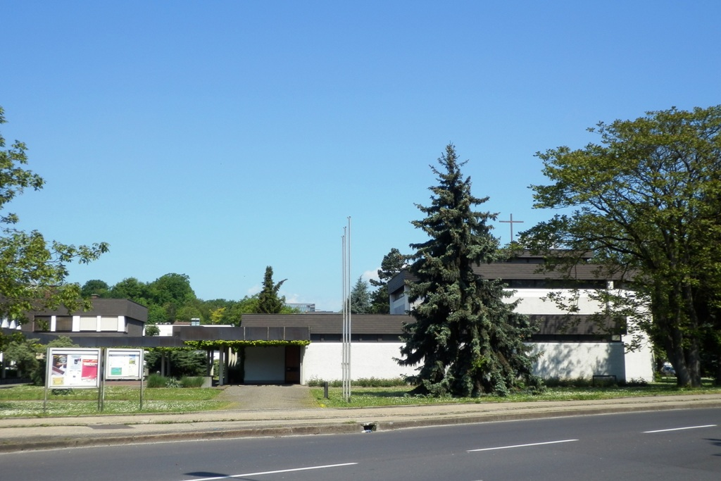 Pfarrkirche Linz - St. Antonius (Neue Welt)